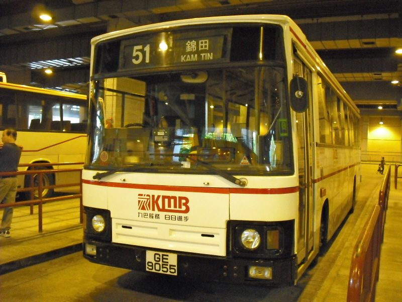 九巴51線，攝於荃灣如心廣場巴士總站